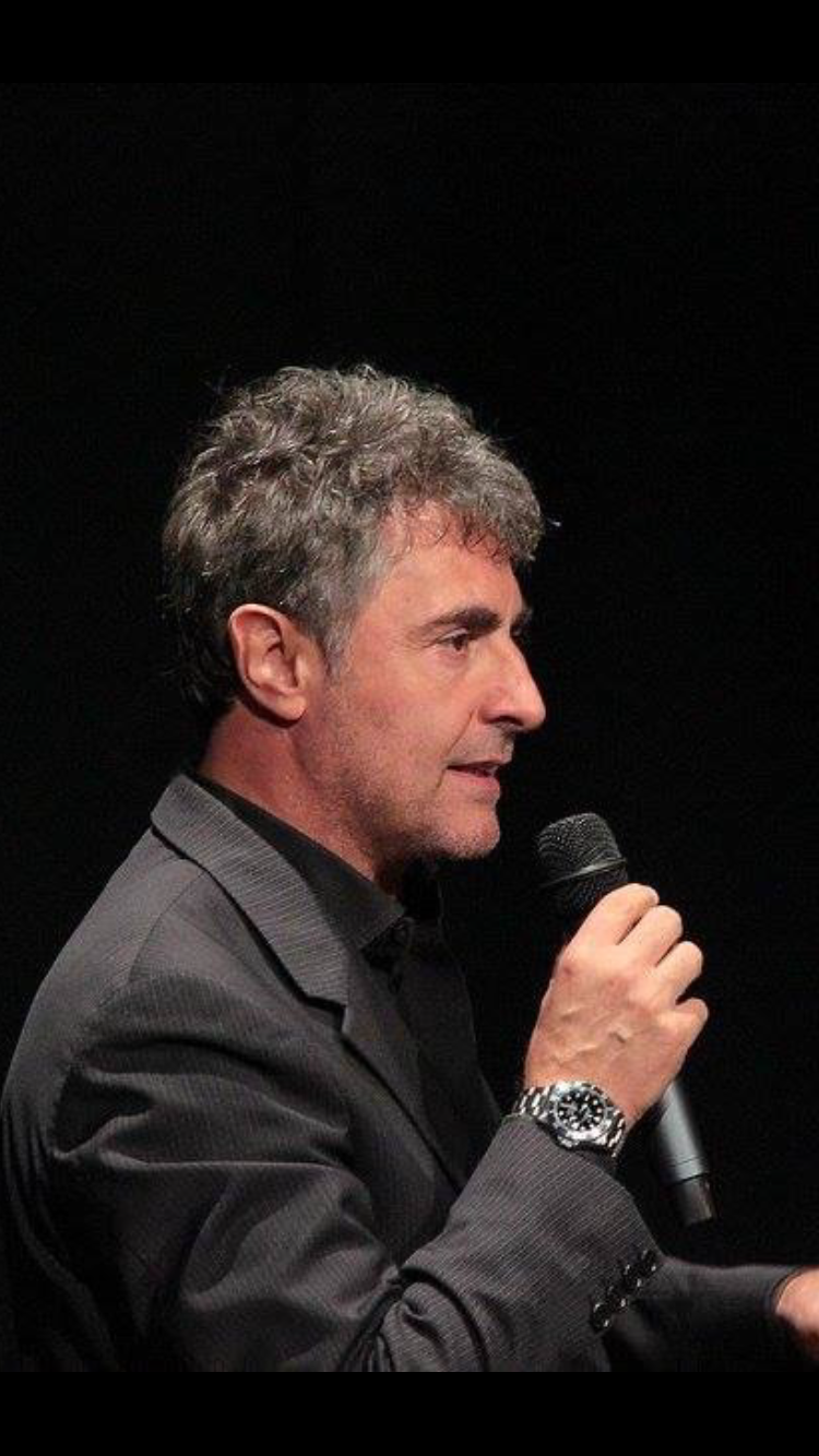 attore, conduttore televisivo e blogger italiano